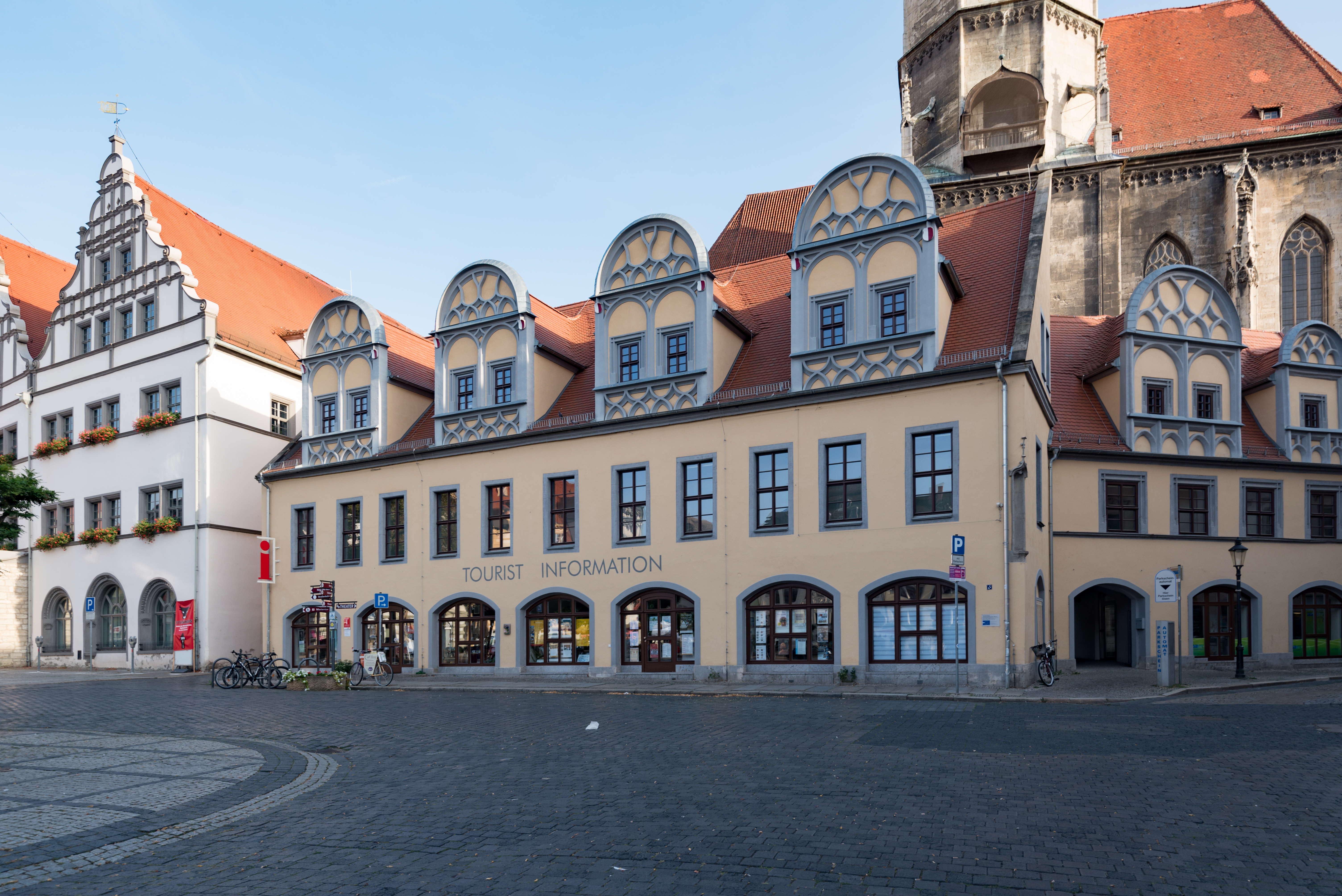 Naumburg (Saale), Markt 6